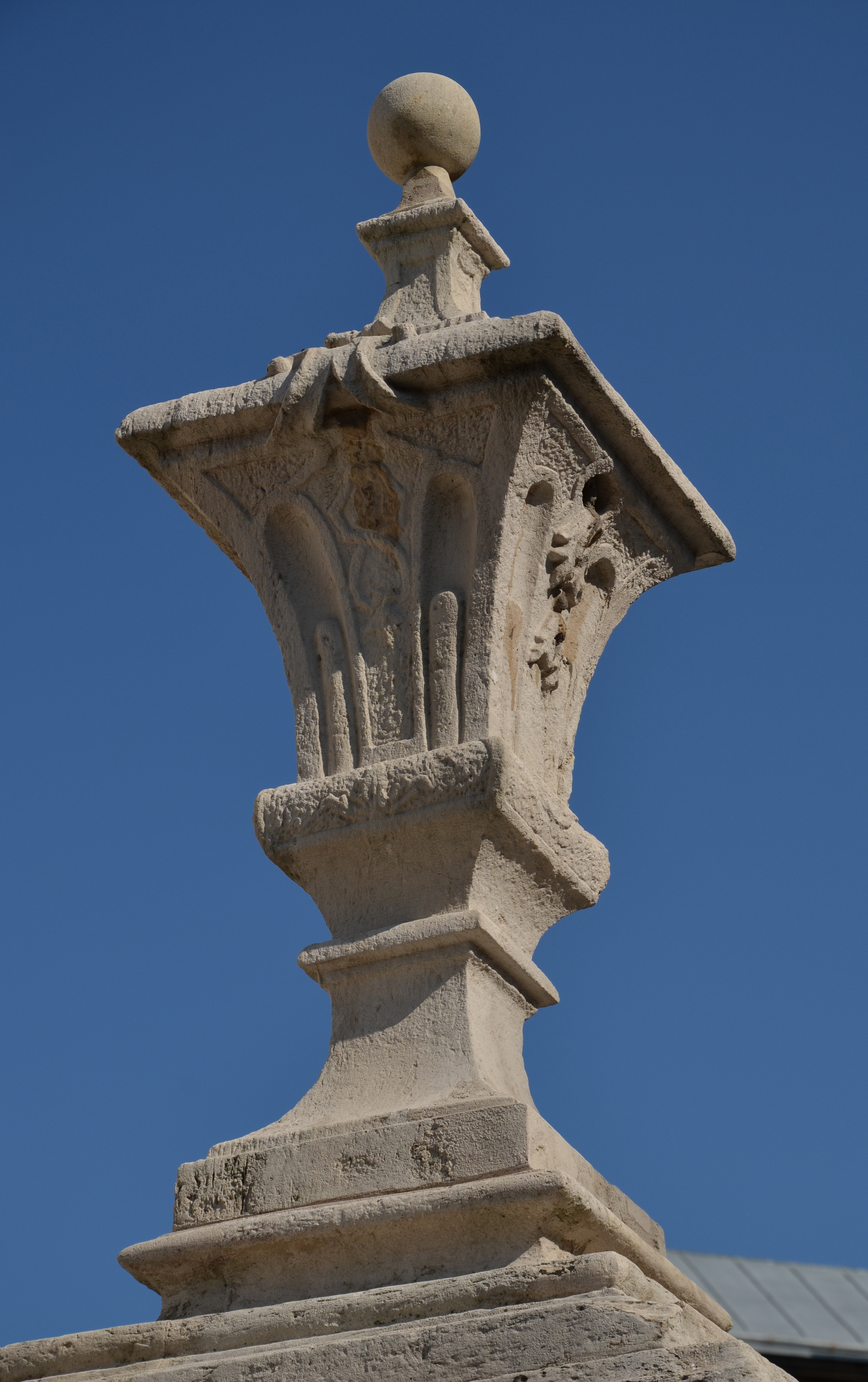 Колона св. Яна з Дуклі біля монастиря бернардинців у Львові.